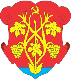 "Радянський" герб Ужгорода: герб Ужгорода за радянських часів